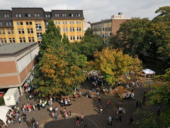 Schulhaus mit Schulhof